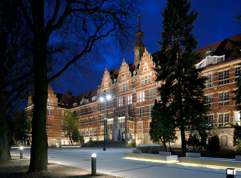 Gmach Główny, Politechnika Gdańska